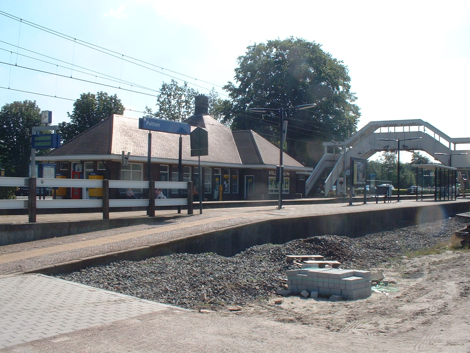 Station Putten